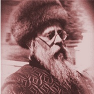 הקדושת ציון מבאבוב